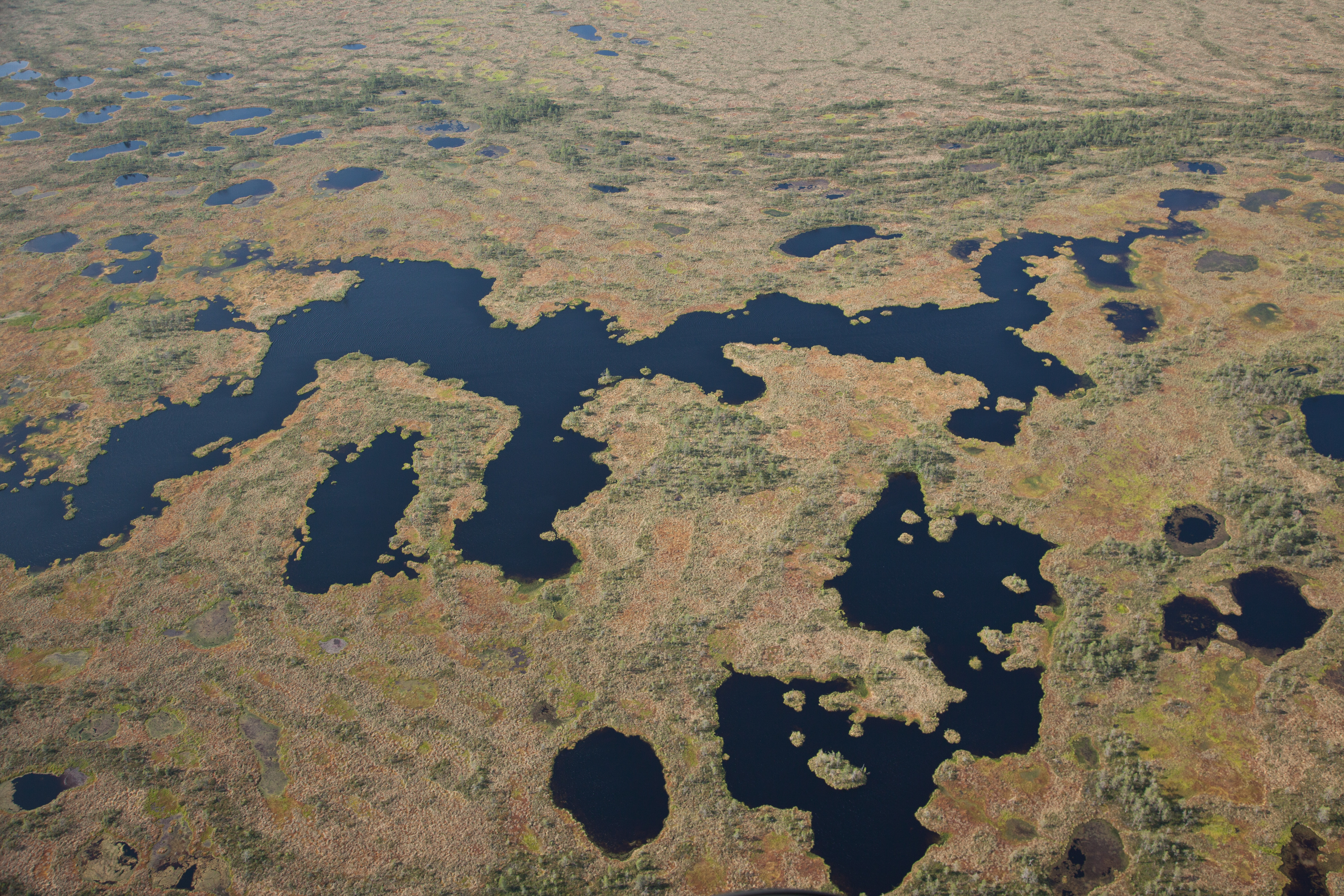 Tallekese järv, Kõnnu Suursoo, Põhja-Kõrvemaa